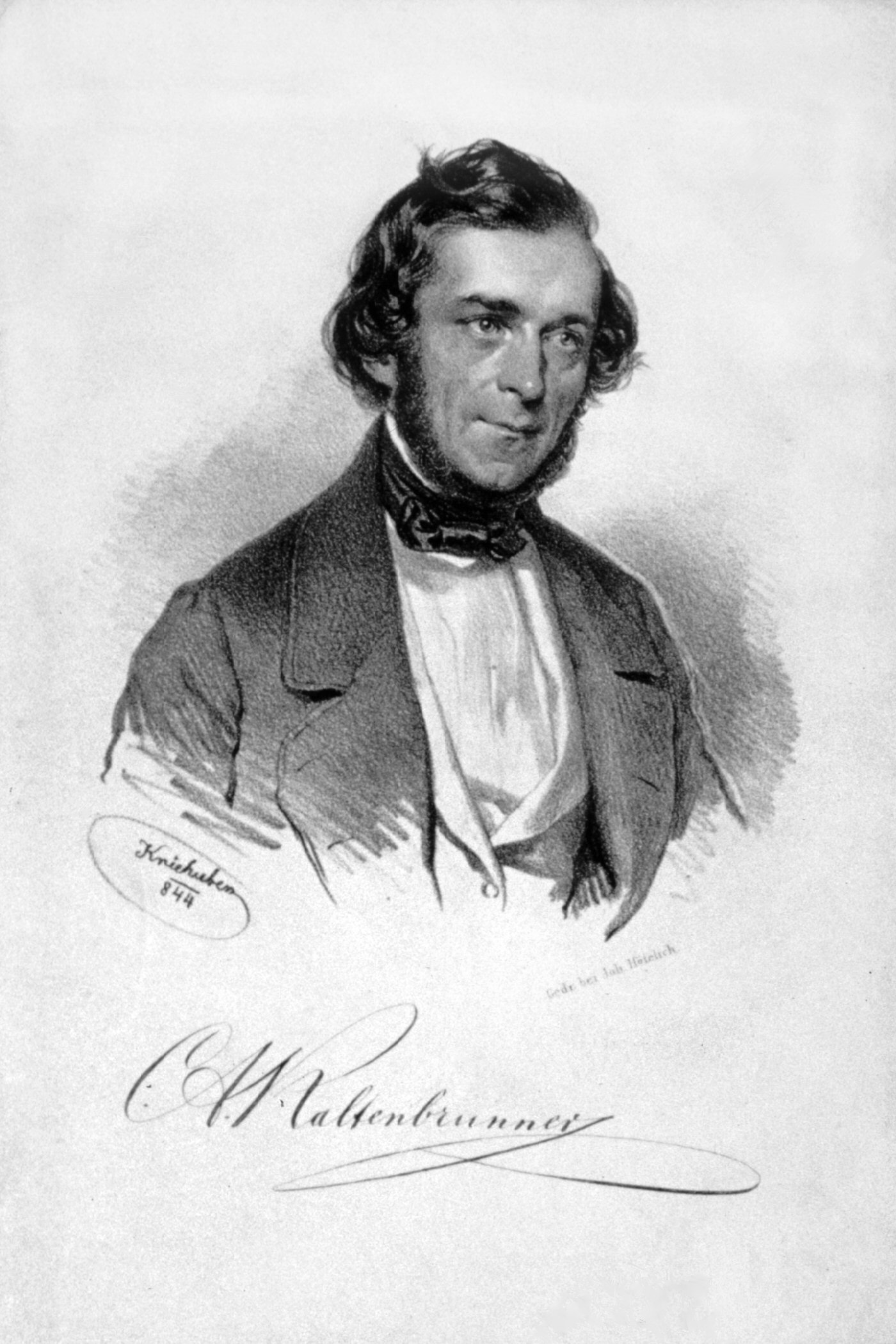 Carl Adam Kaltenbrunner (1804-1967), österreichischer Dichter und Schriftsteller. Lithographie von Josef Kriehuber, 1844